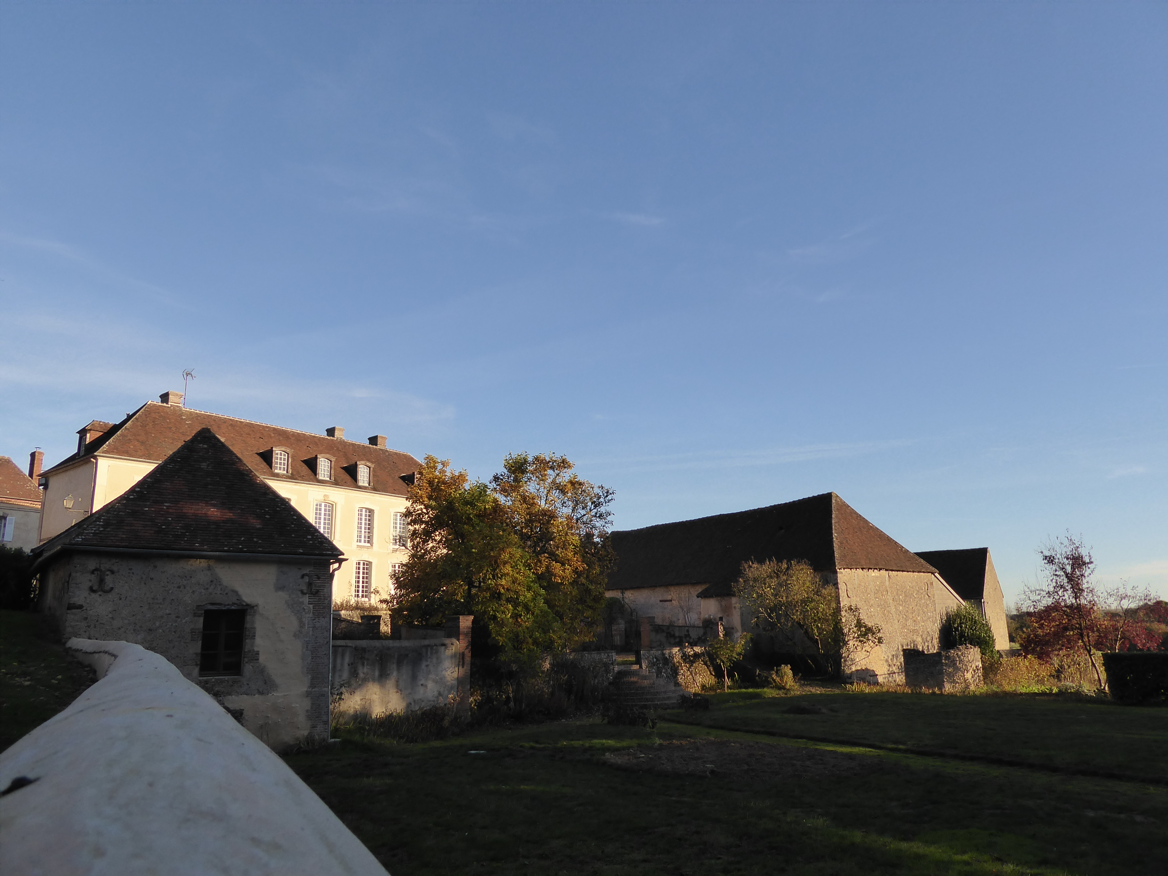 Presbytère du Mage, dans l'Orne.